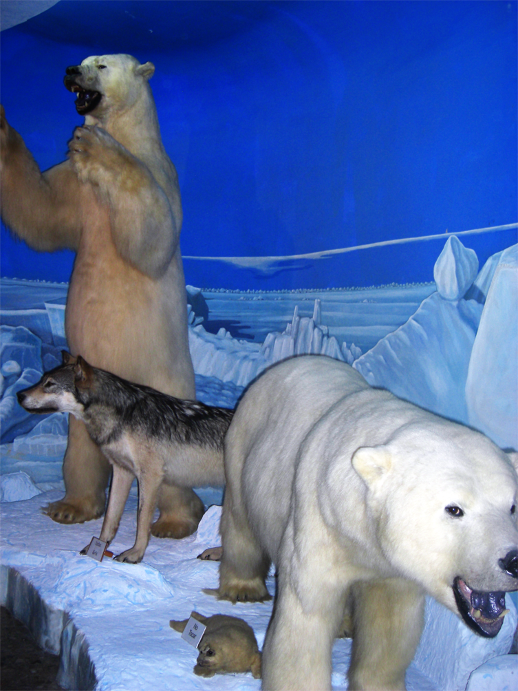 Oso polar del Museo de Caza Benito Albarrán